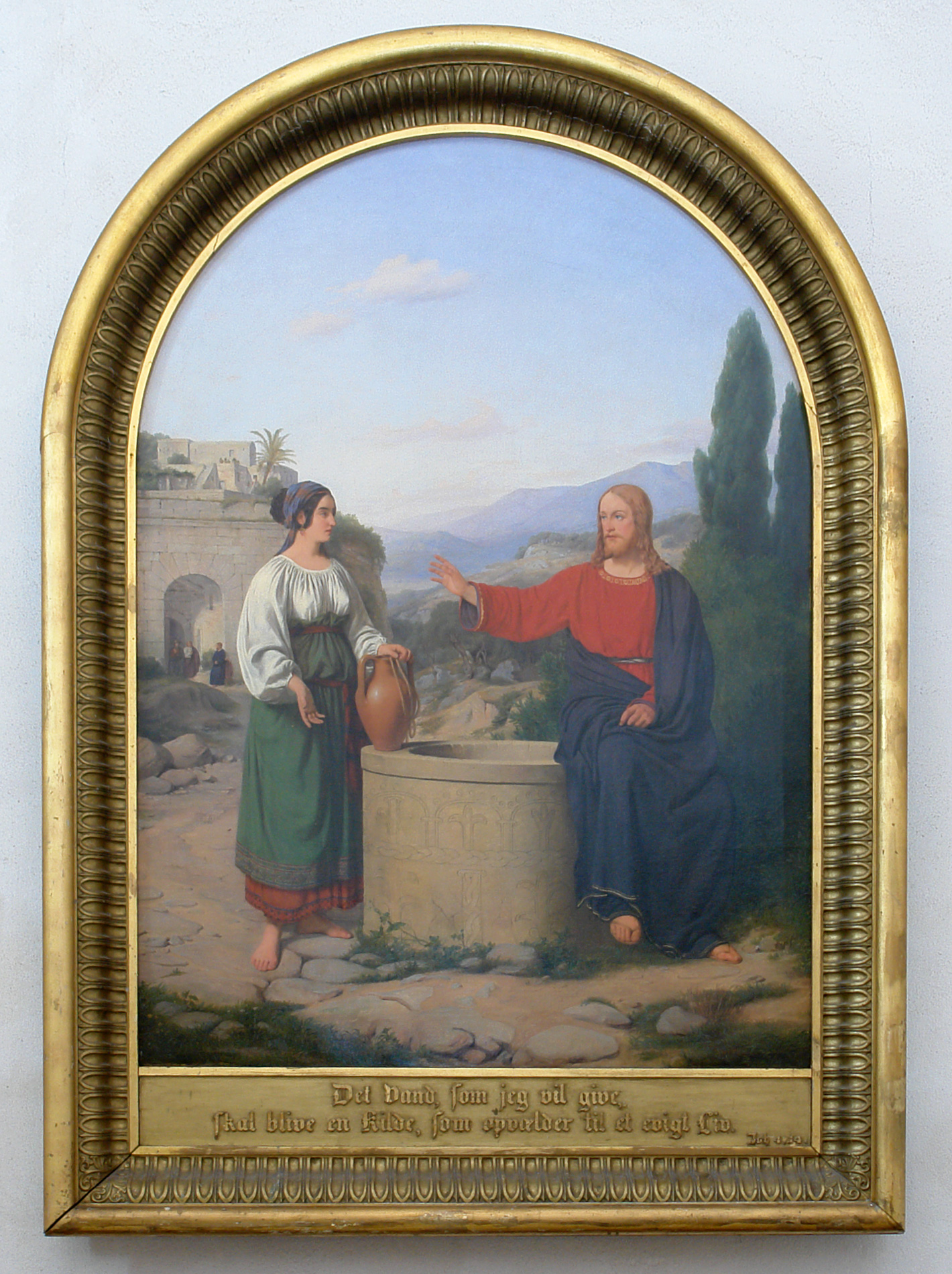 Kirche von Nødebo, Dänemark (Nord-Seeland). Altarbild im Turmraum „Jesus und die Samariterin“, 1839 gemalt von Jørgen Roed